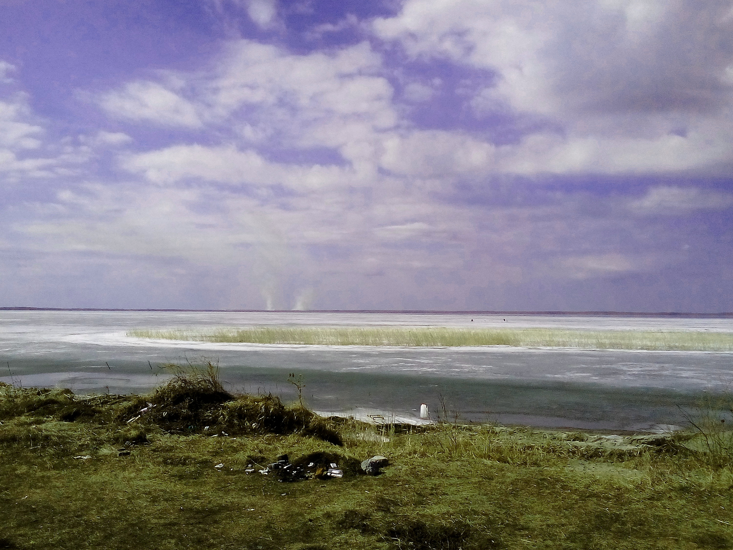 Весенний Шаблиш.